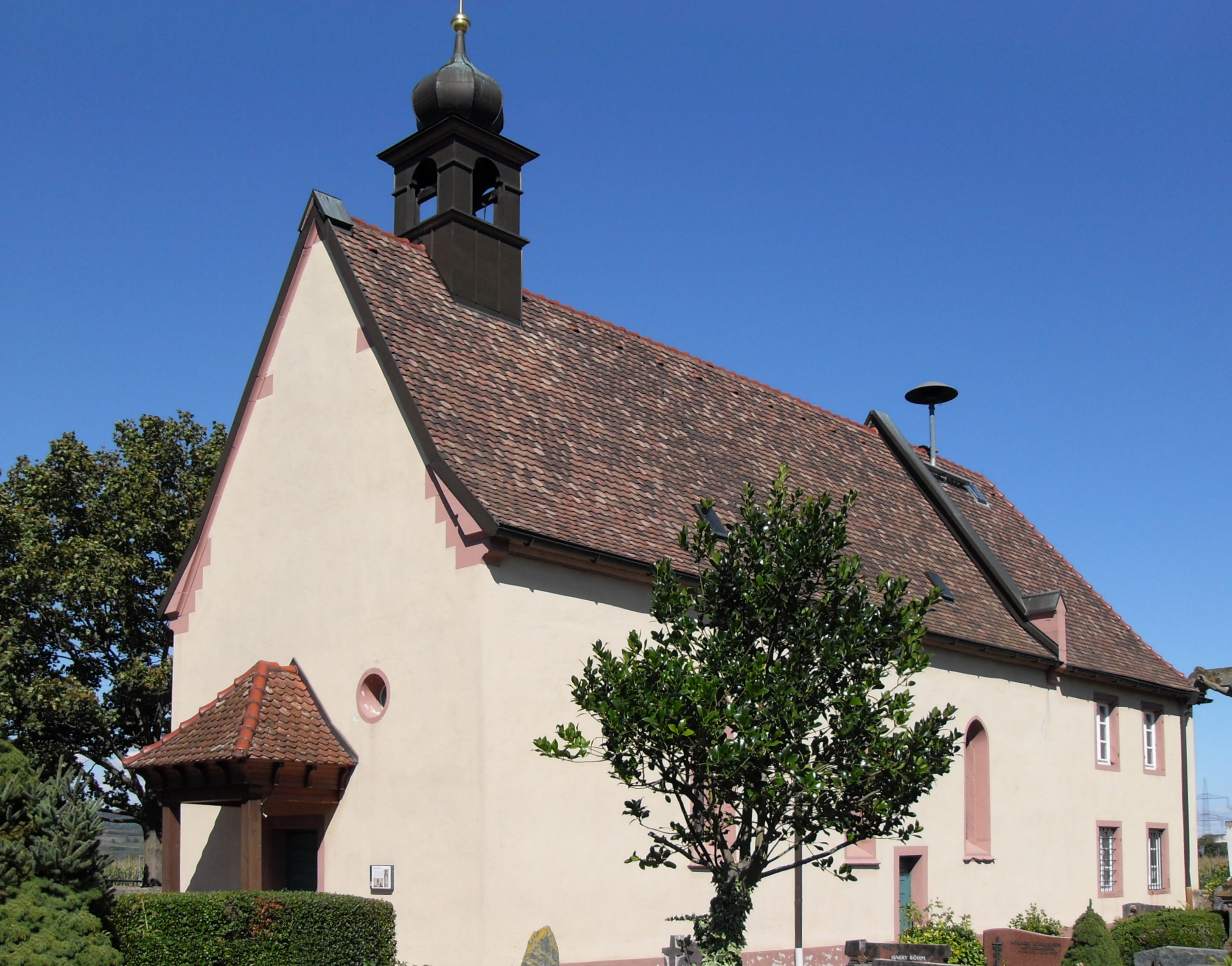 Verenenkapelle im Breisacher Stadtteil Hochstetten